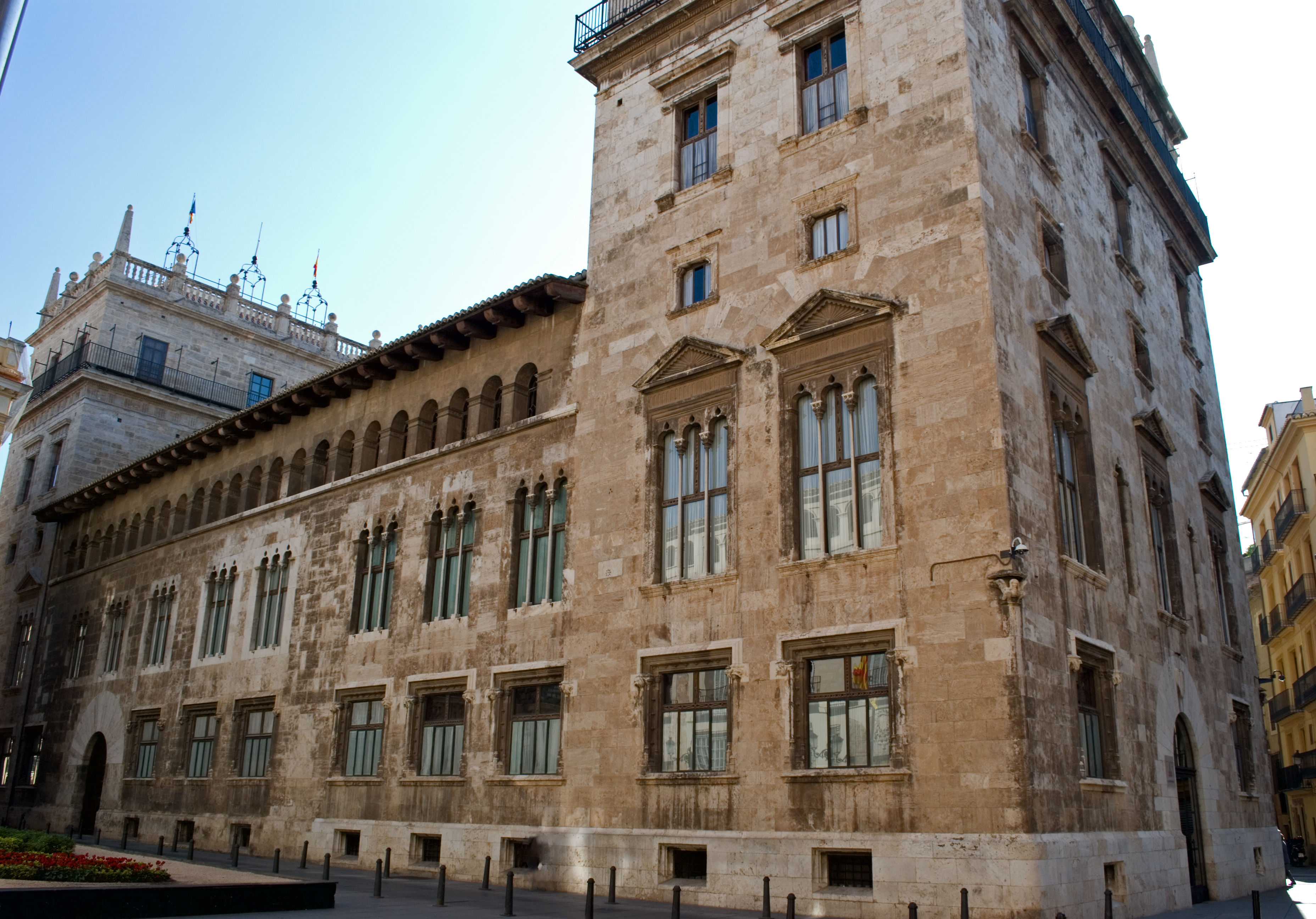 Palacio de la Generalitat, Valencia